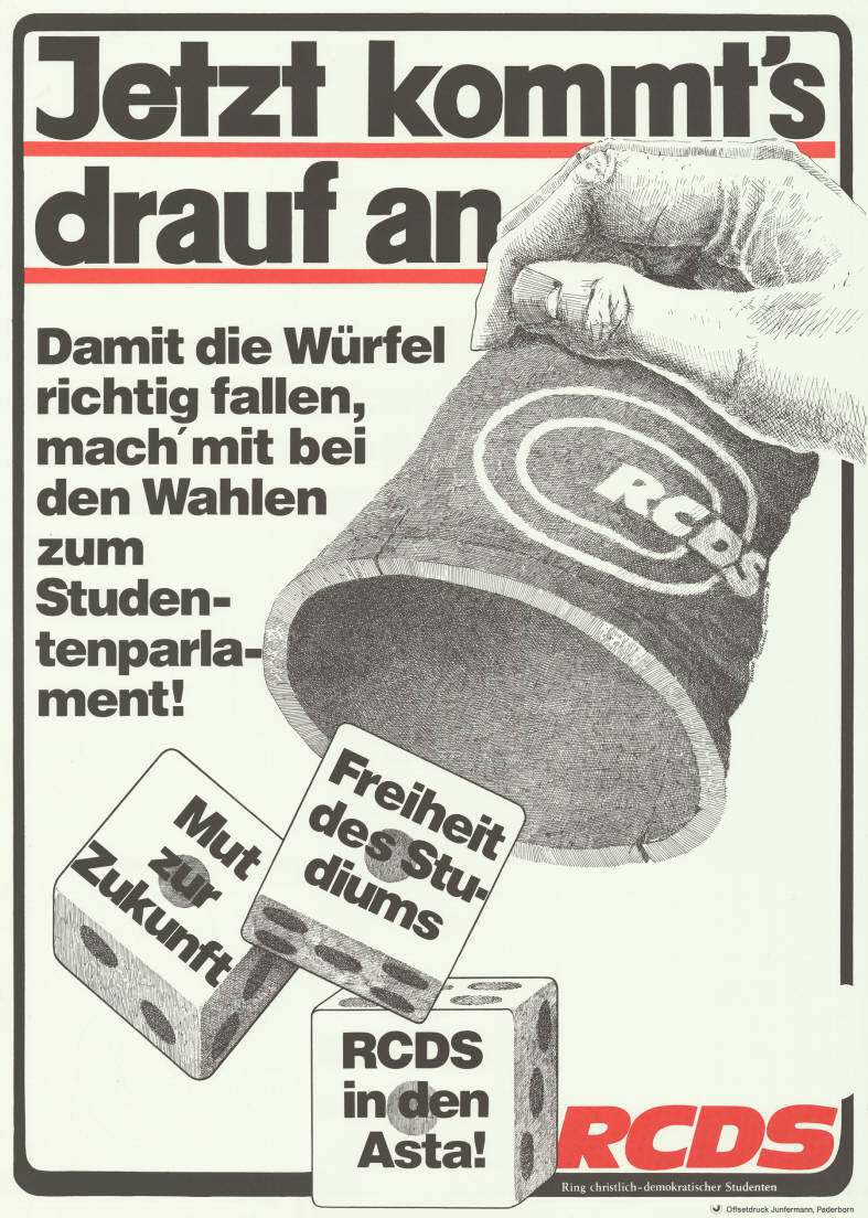 Jetzt kommt's drauf an Damit die Würfel richtig fallen, mach' mit bei den Wahlen zum Studentenparlament Mut zur Zukunft Freiheit des Studiums RCDS in den Asta! RCDSAbbildung:RCDS-Würfelbecher mit Würfeln (Grafik)Plakatart:Motiv-/TextplakatAuftraggeber:RCDS NRWDrucker_Druckart_Druckort:Offsetdruck Junfermann, PaderbornObjekt-Signatur:10-029 : 18Bestand:Plakate von Hochschulgruppen (10-029)GliederungBestand10-18:Plakate von Hochschulgruppen (10-029) » RCDSLizenz:KAS/ACDP 10-029 : 18 CC-BY-SA 3.0 DE